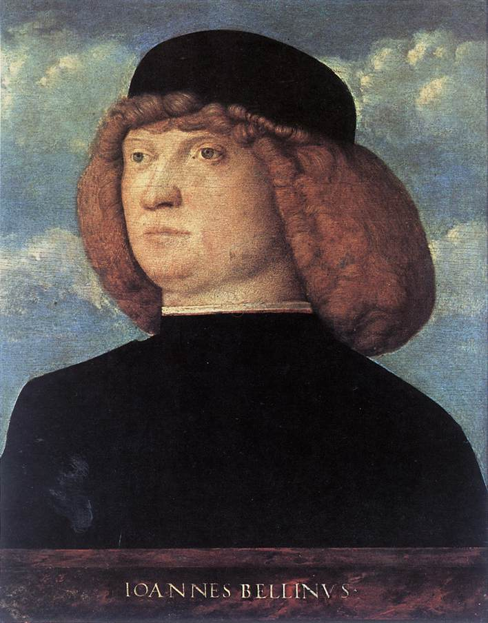 Портрет молодого человека, предположительно автопортрет.